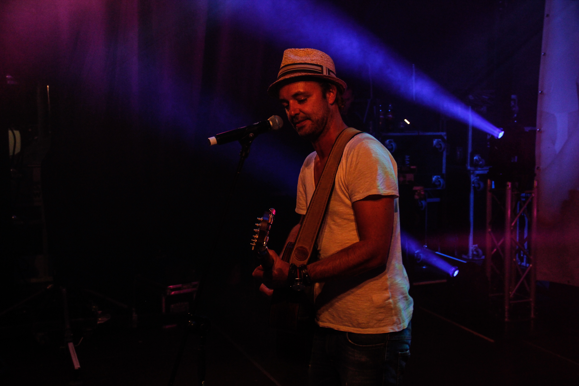 Niels Geusebroek tijdens Gouden Pijl 2013 in Emmen